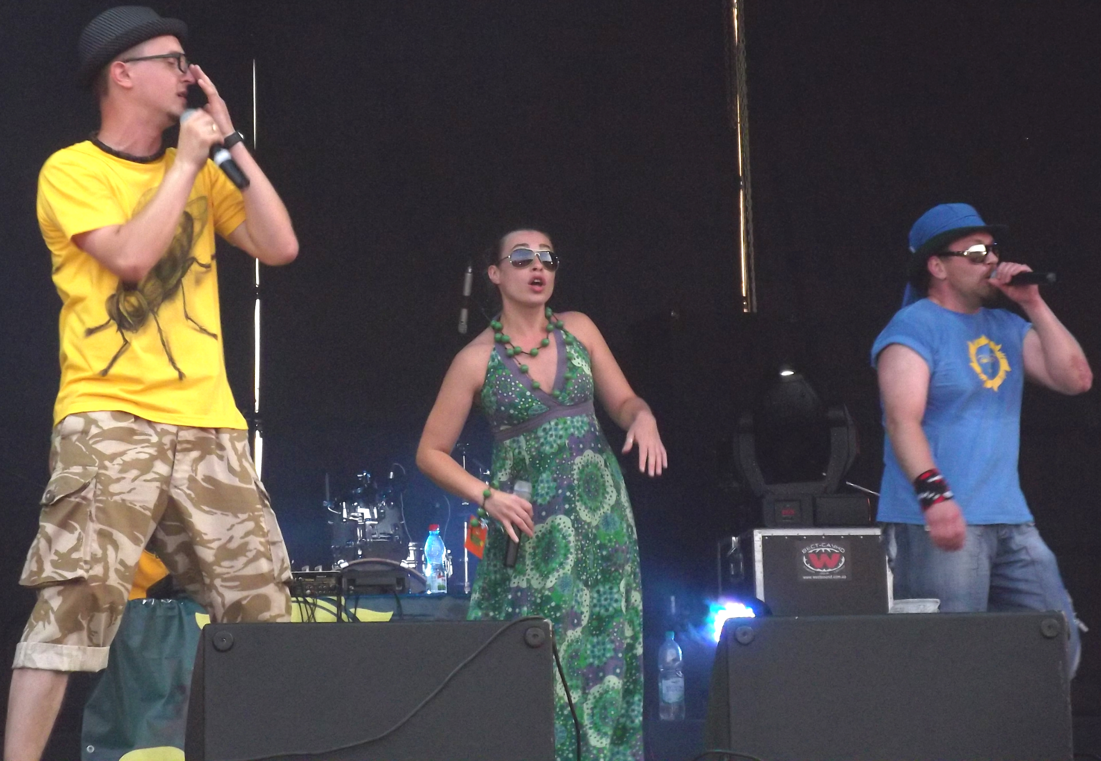 Флайза: гурт ФлайzZzа